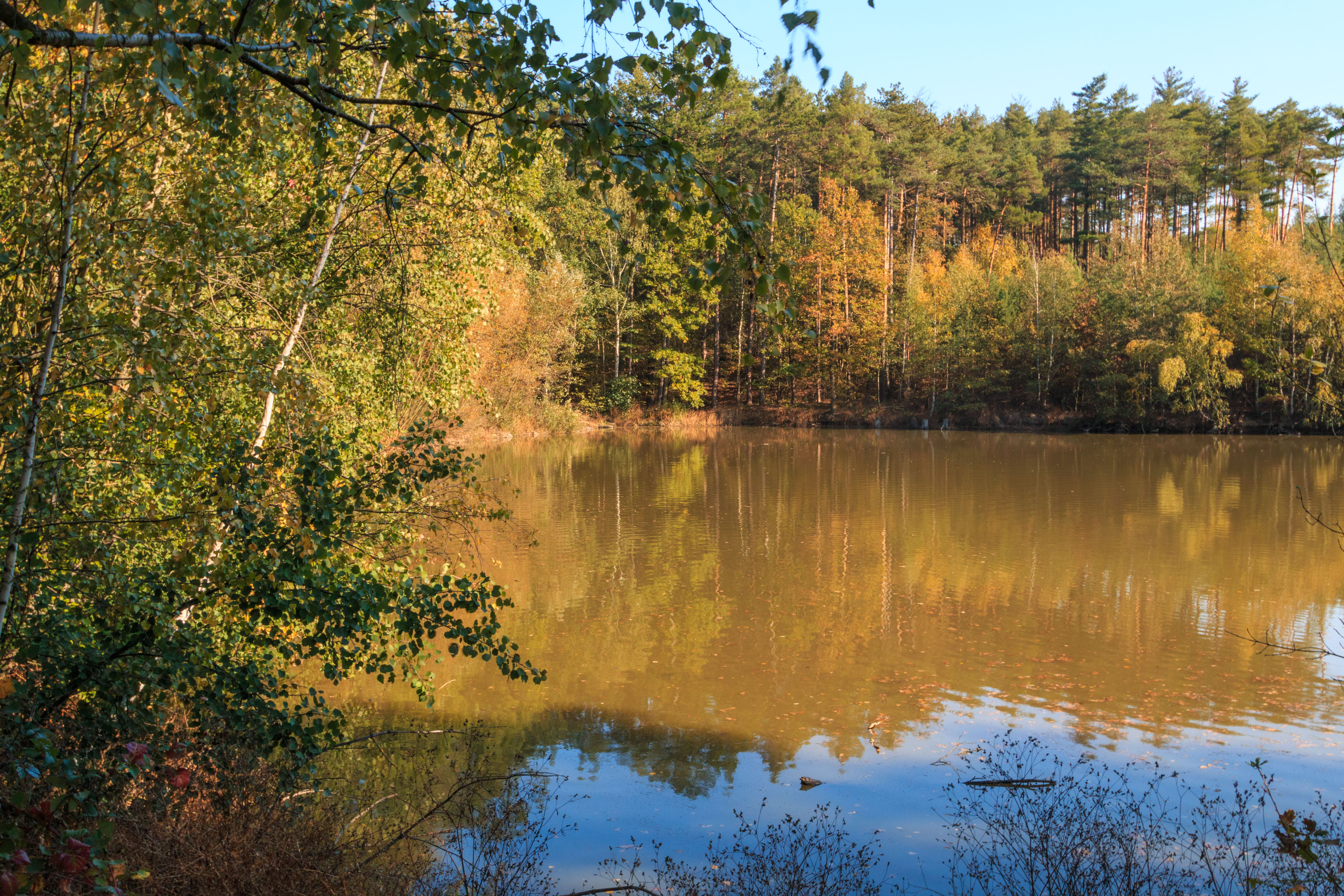 Spálenecké rybníky u Bítovánek Project: Vodstvo. Ticket: 1617.